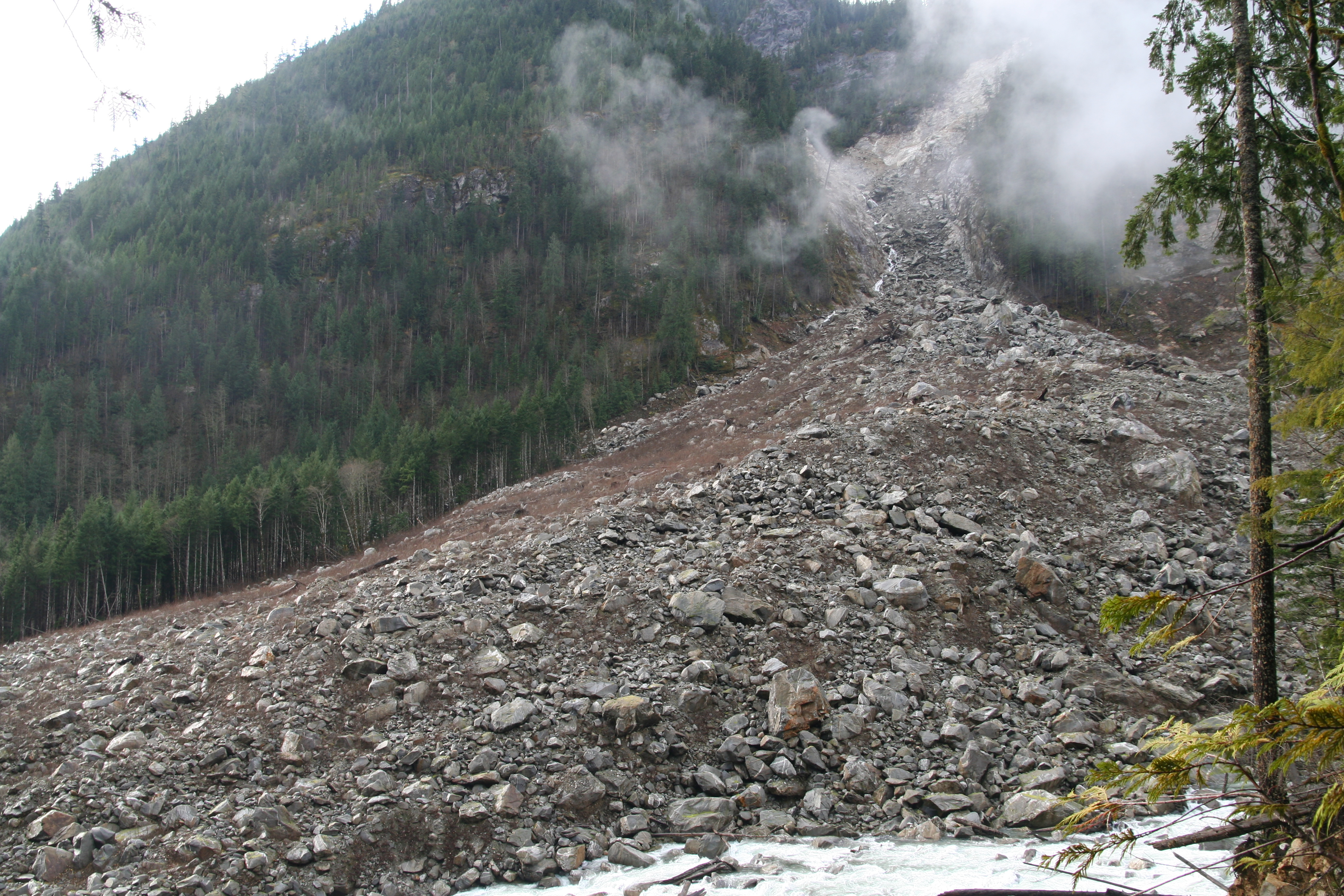 Goodell Creek Debris Avalanche